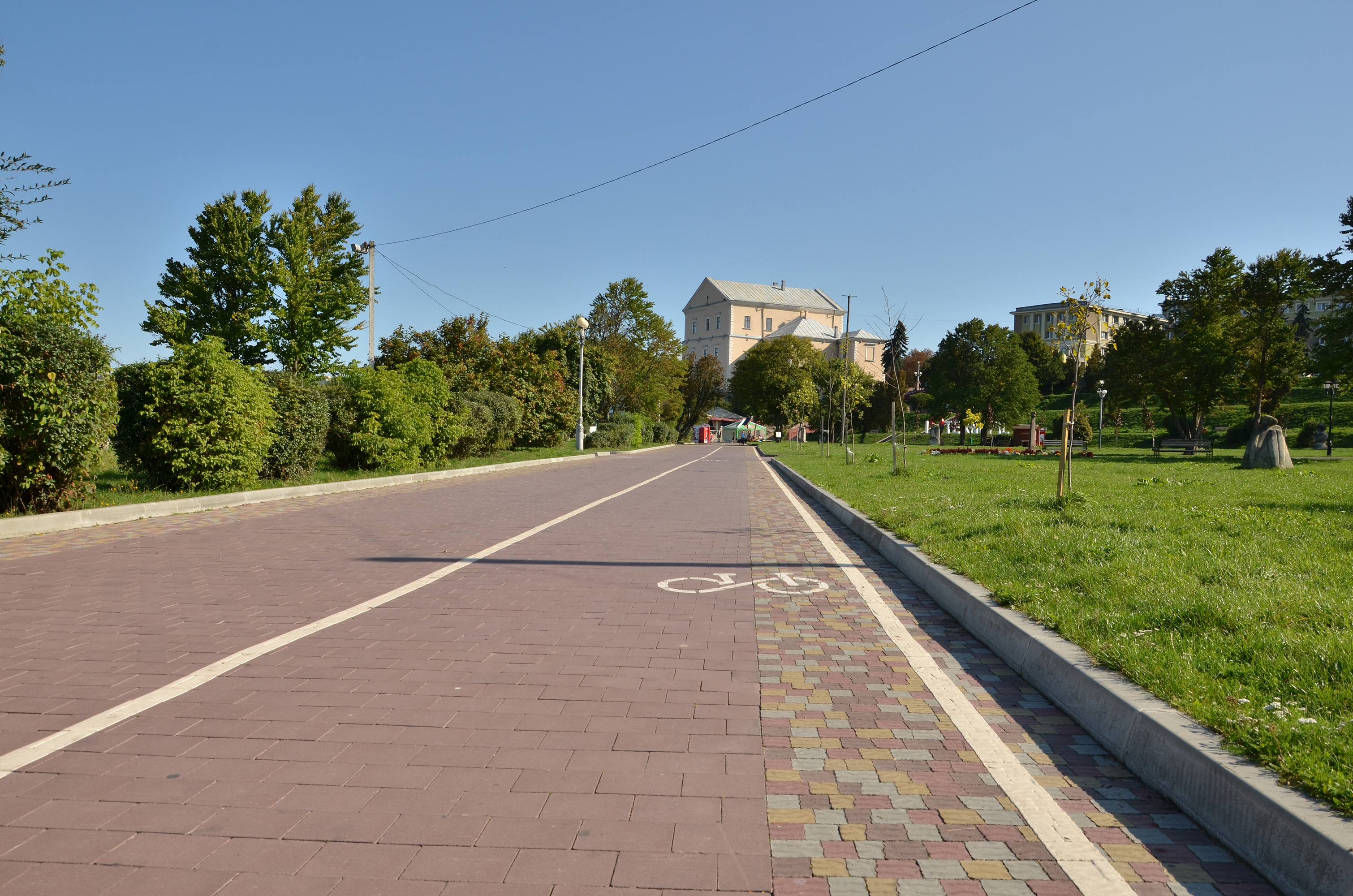 Вигляд на Старий замок Тернополя з південного боку парку імені Тараса Шевченка. Велосипедна доріжка в парку.